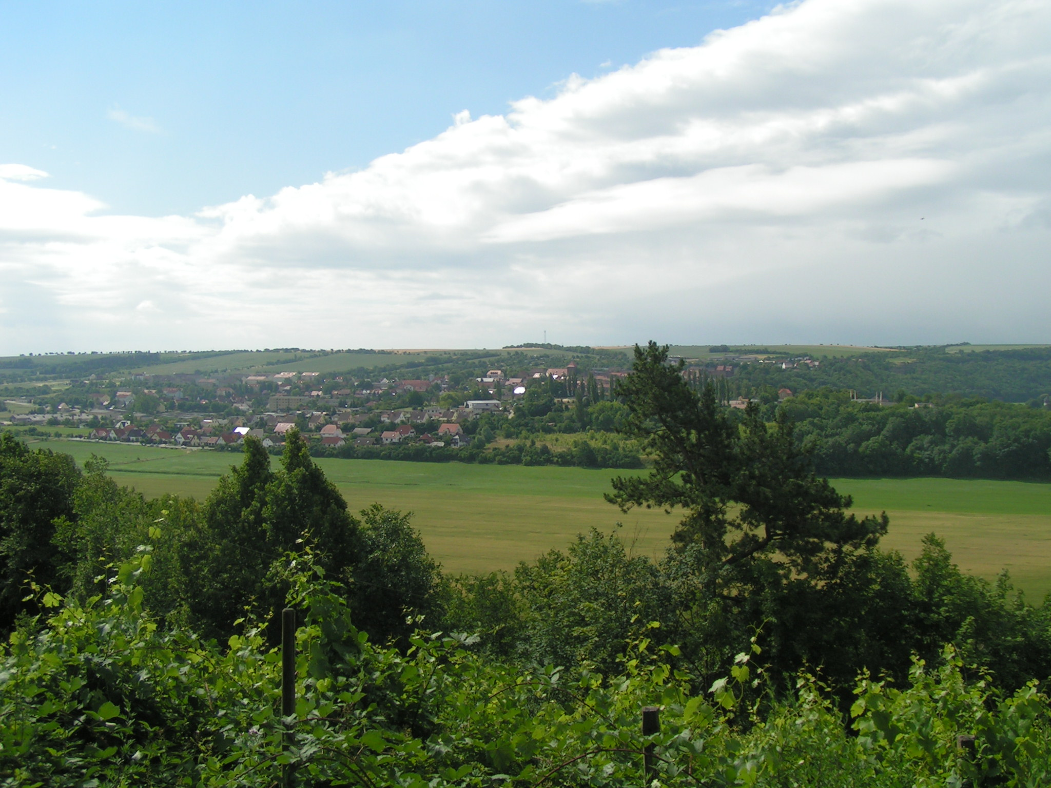 Blick auf Nebra (von Vitzenburg)